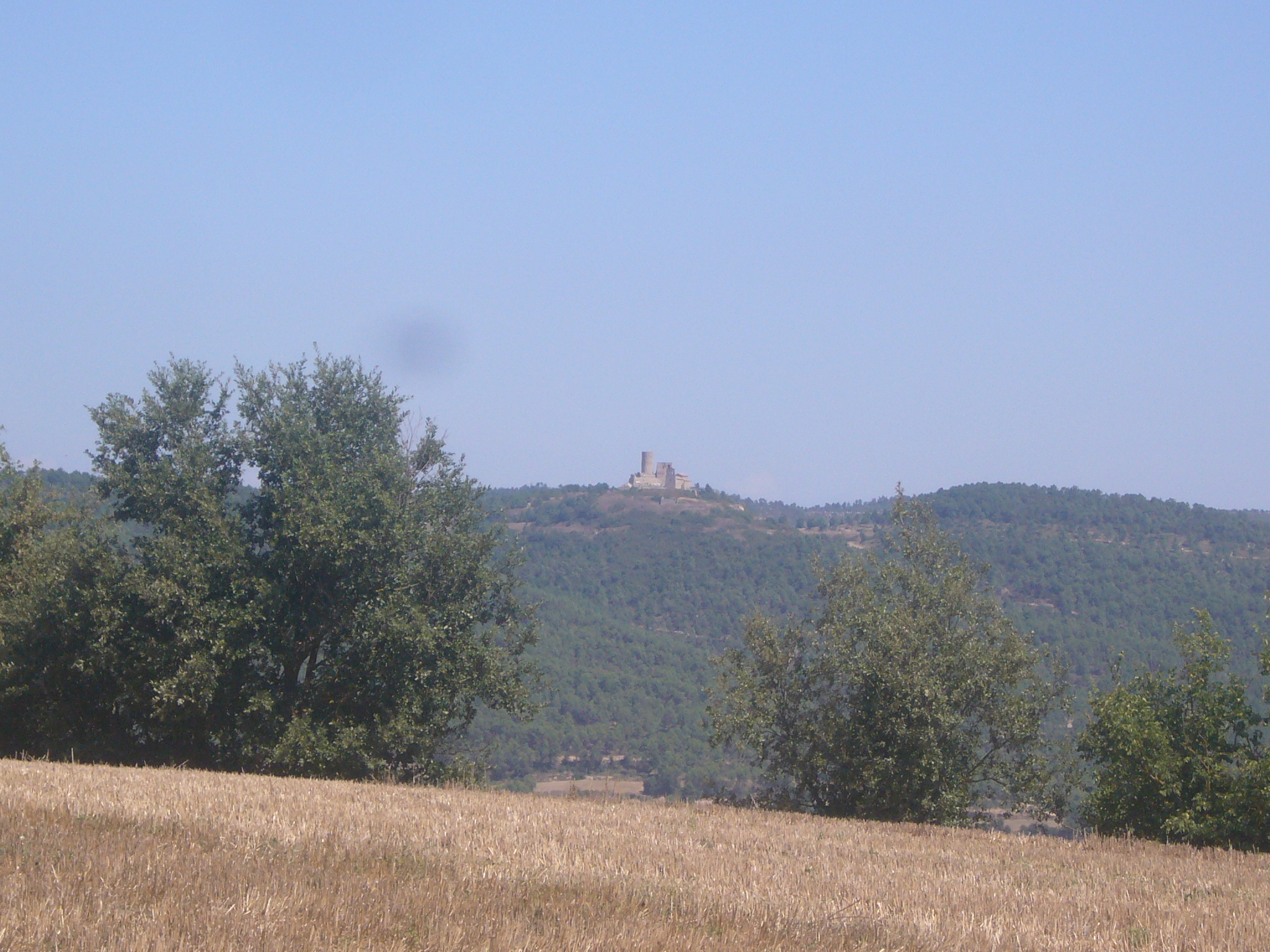 Turó de Boixadors, vist des de la Llavinera. Castell al cim.